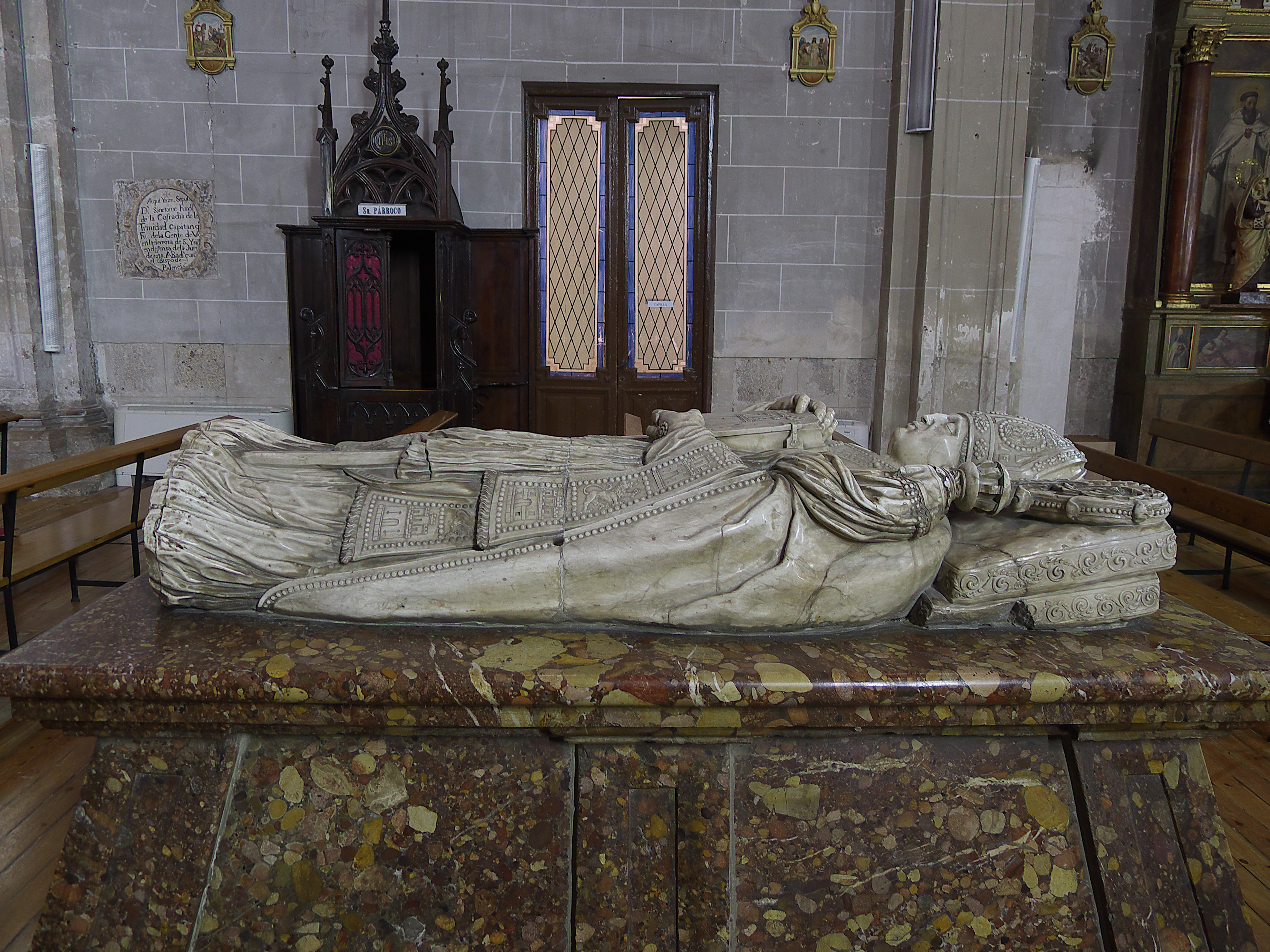 Iglesia de Santa María Magdalena (Valladolid). Pedro de la Gasca, Presidente de la Audiencia del Perú, obispo de Palencia y Sigüenza, falleció el 10 de noviembre de 1567. Esteban Jordán firma contrato de construir el bulto de alabastro (1571).